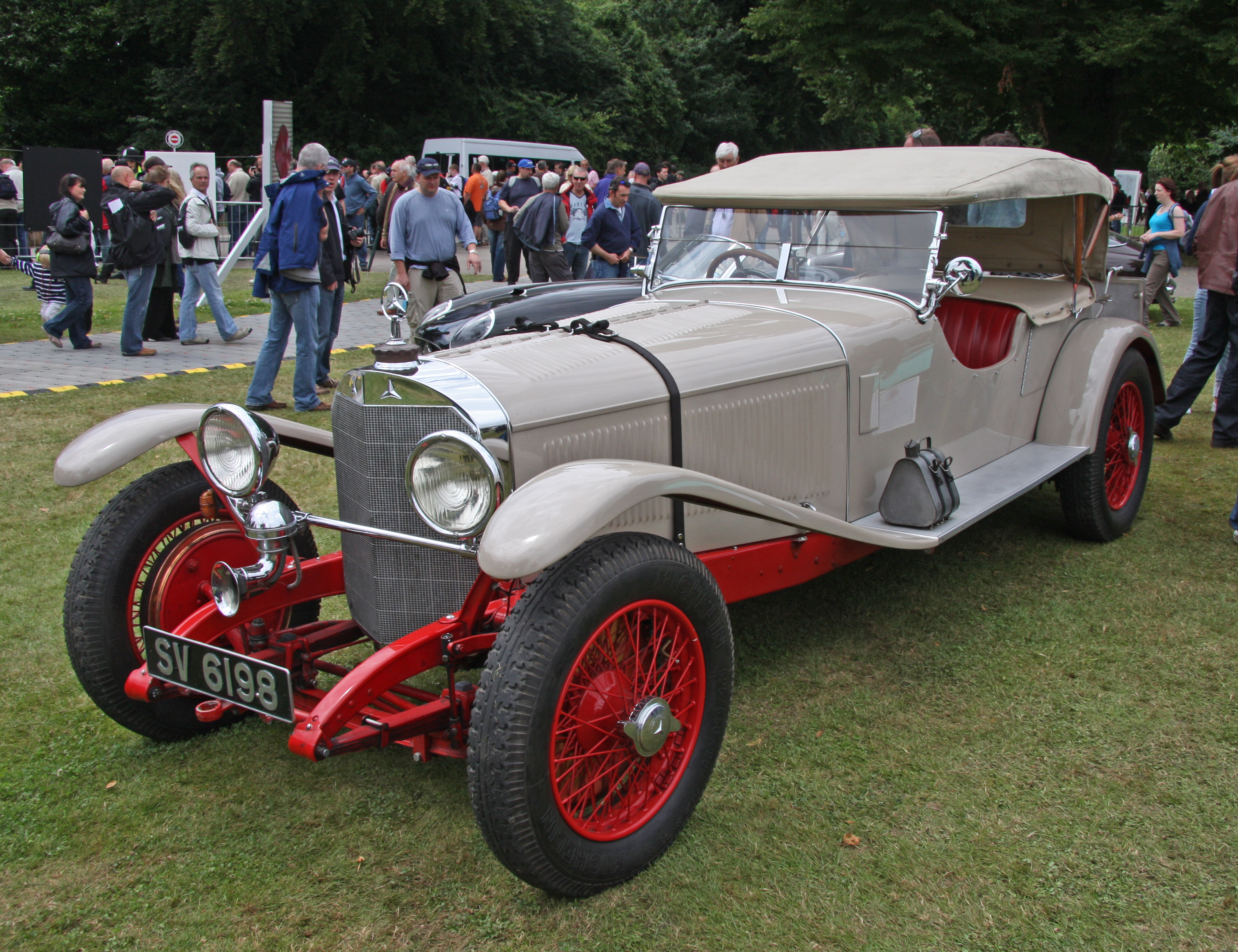 1927 Mercedes-Benz 26180 S-Type Rennsport